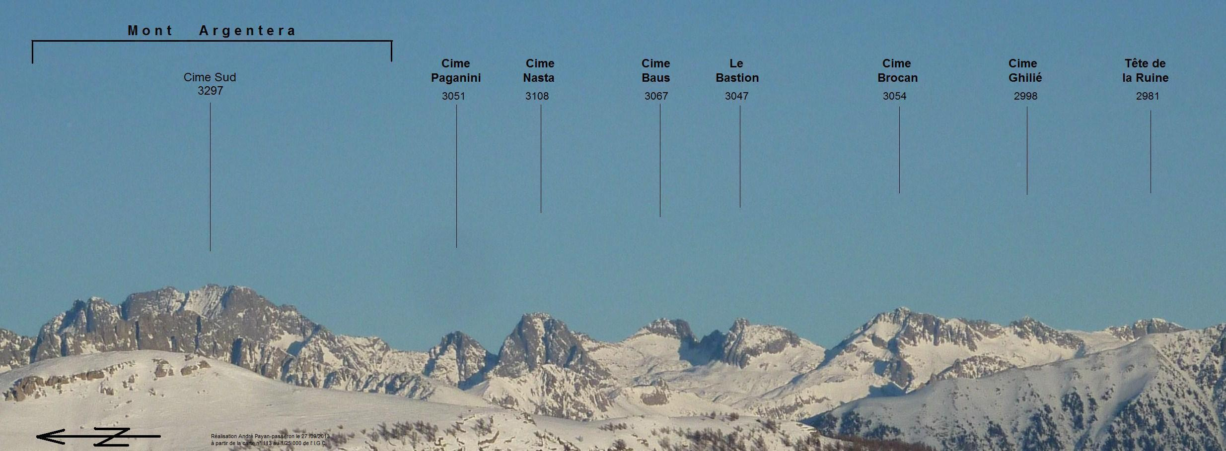 Le chaînon pricipal Nord-Sud du massif de l'Argentera. Photo prise au téléobjectif de l'ouest-sud-ouest vers l'est-nord-est (avec un angle de 11°) à 29 km de distance de la tête de Charnaye (1792 m à 3°36 Est et 48° 87 Nord) située à 2,7 km au N.E. de la station de Valberg (06 - Alpes-Maritimes - FRANCE)